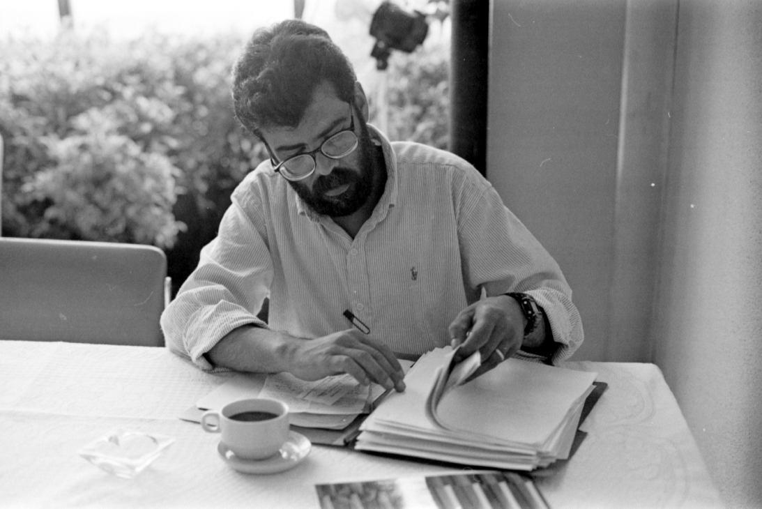 Alfonso Cano Jefe de delegación de la Coordinadora Guerrillera Simon Bolívar durante los diálogos de paz entre las insurgencias revolucionarias y el gobierno de Cesar Gaviria (Caracas-Tlaxcala)